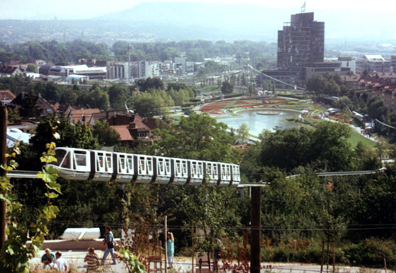 Einschienenbahn bei der IGA 1993 in Stuttgart modified file IGA93-Panoramabahn.jpg Date Summer 1993 Author Vux